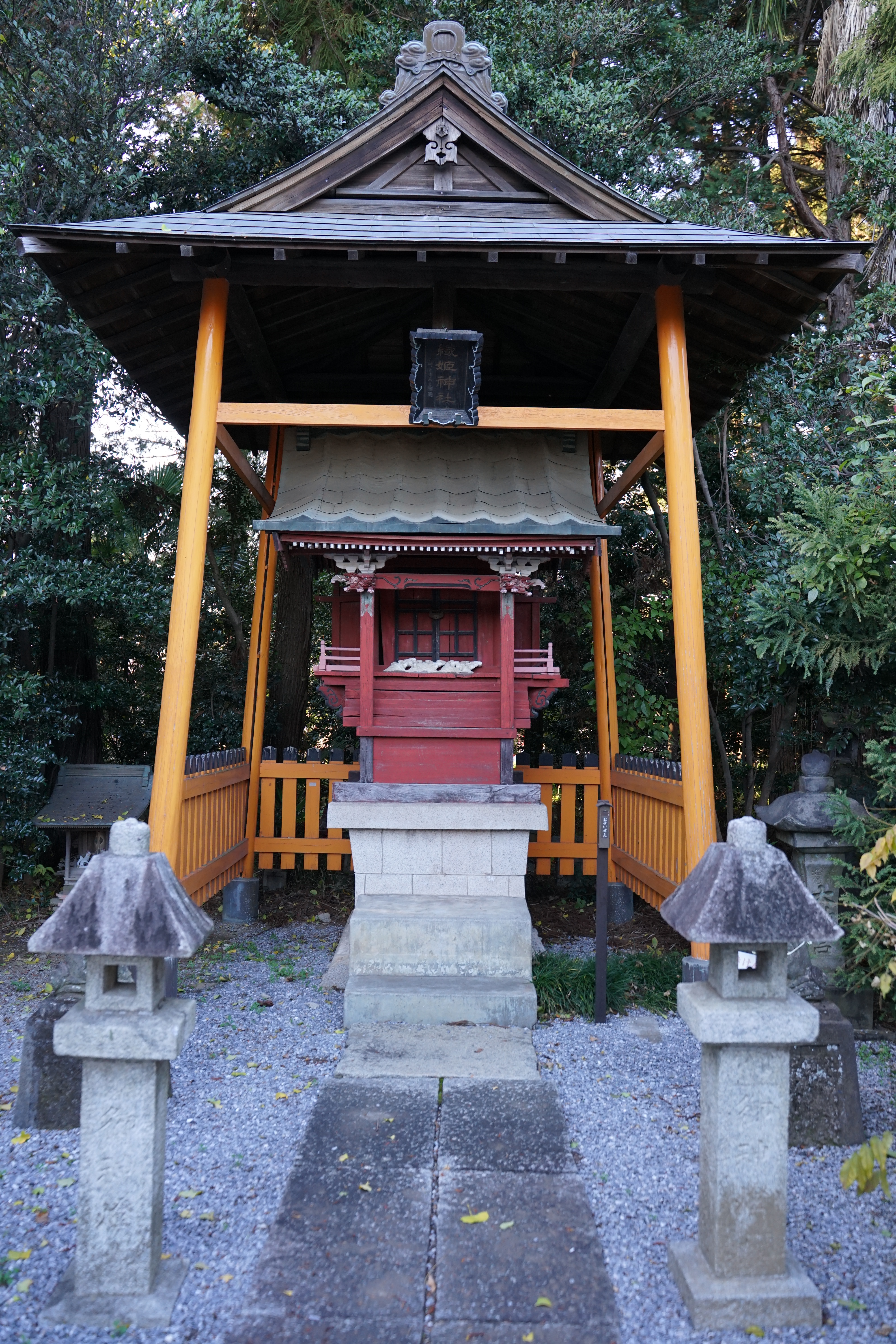 長良神社（群馬県館林市代官町）の境内社『織姫神社』の社殿 Sony ILCE-7M2